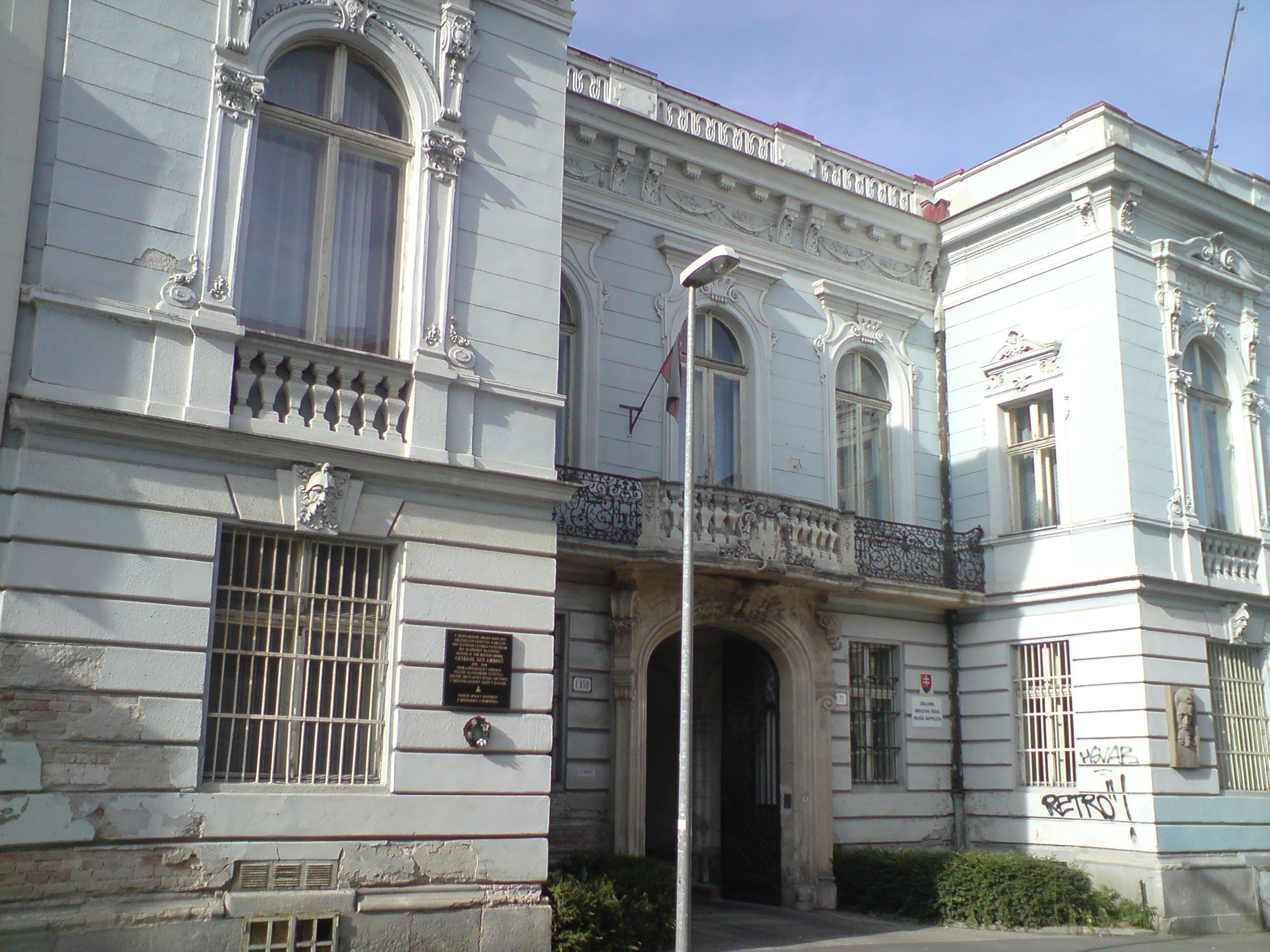 Georgievitsov palác, Panenská, Bratislava